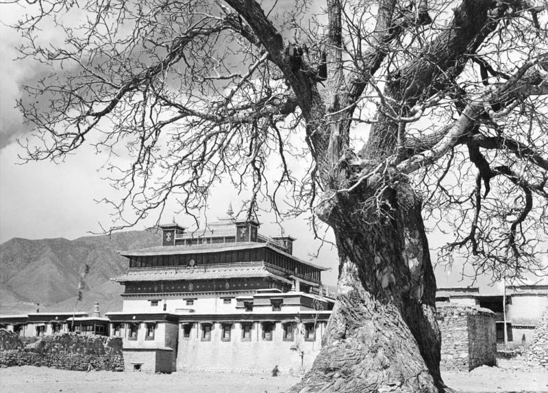 Tibetexpedition, Kloster Samye Samjeh [Samye], Haupttempel des Klosters Samjeh